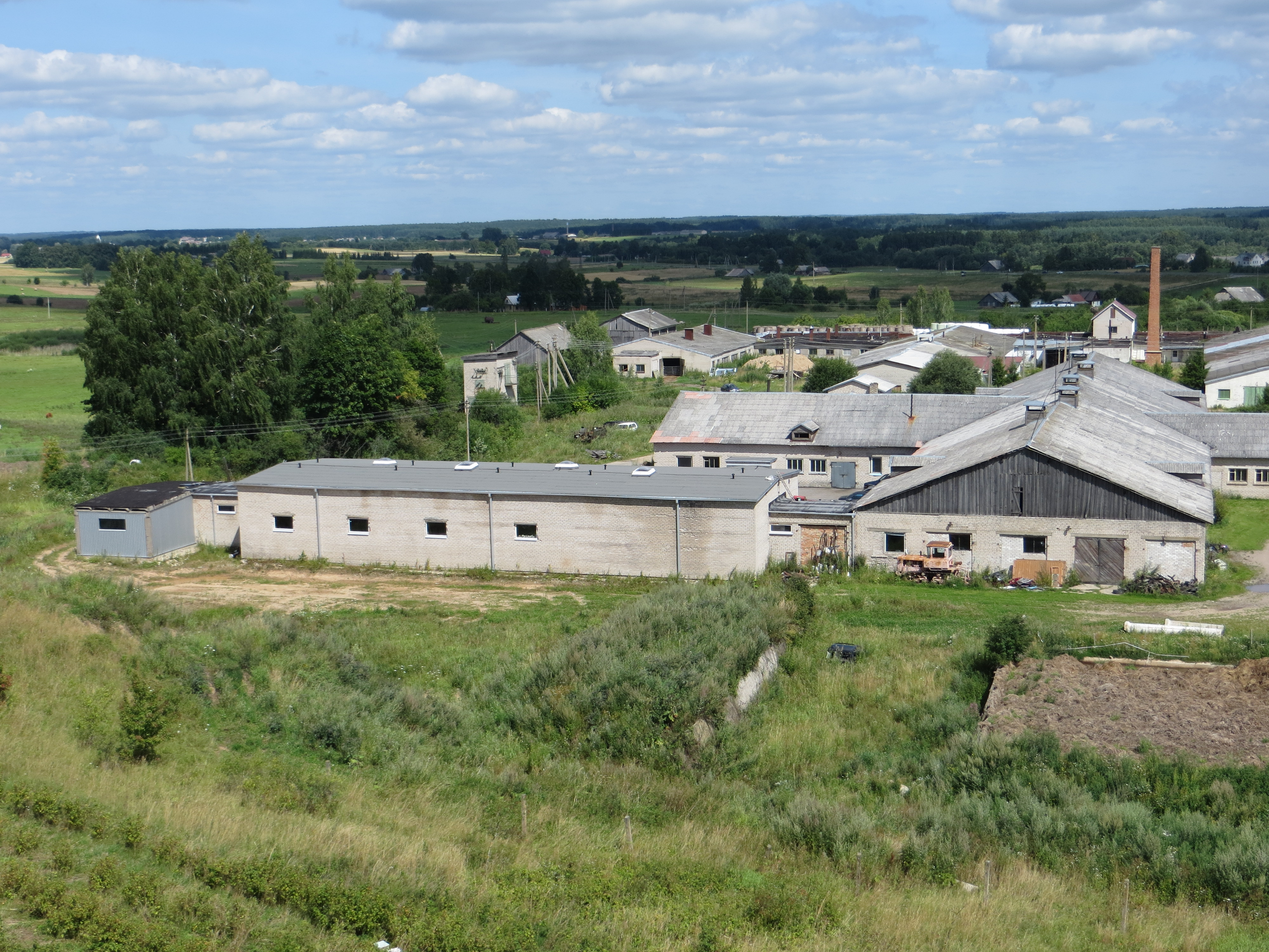 Šiaudiniai, Lithuania